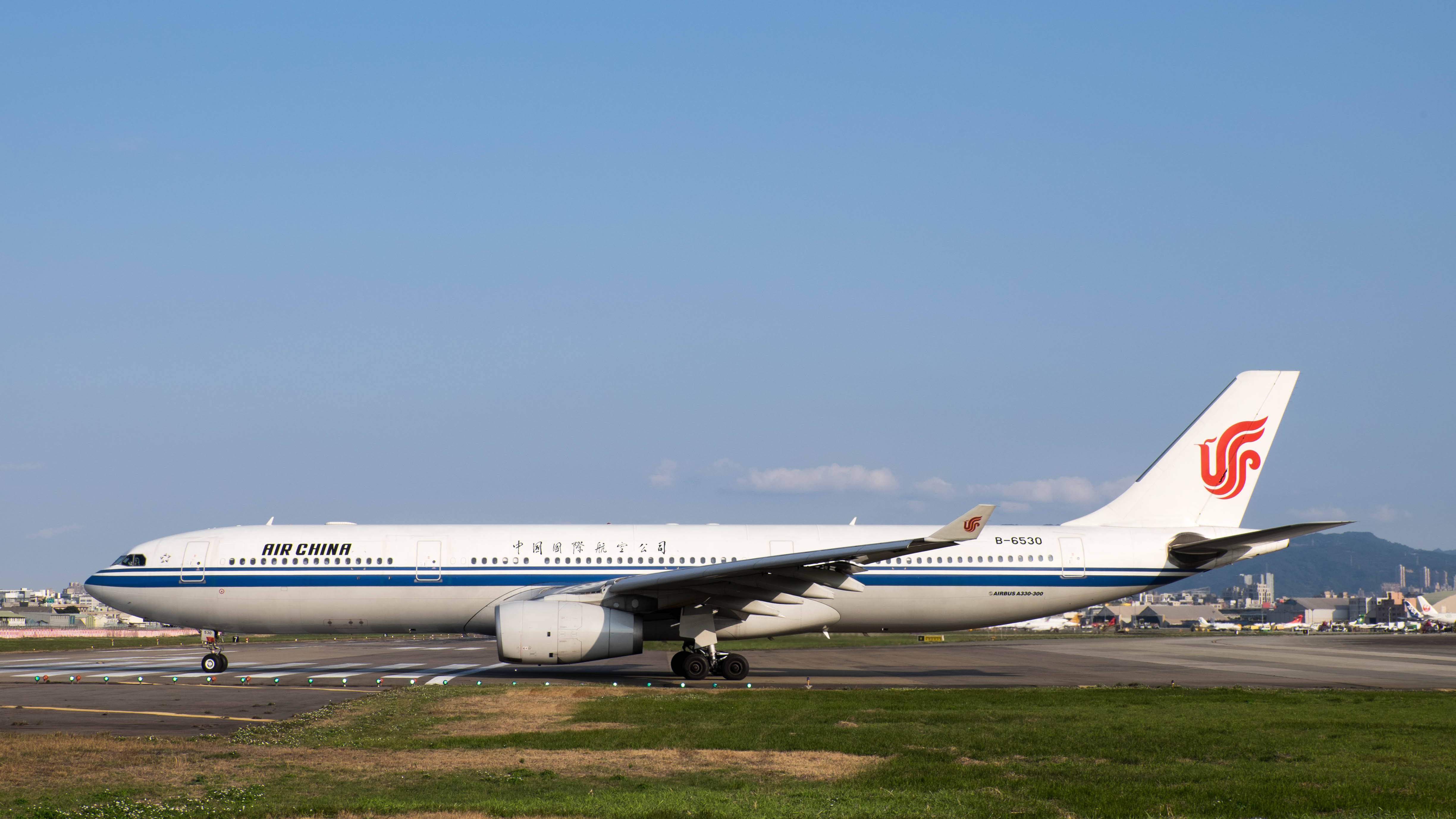 中文（台灣）: 中國國際航空空中巴士A330-343X B-6530進入臺北松山機場跑道。